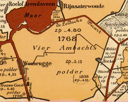 Vierambachtspolder